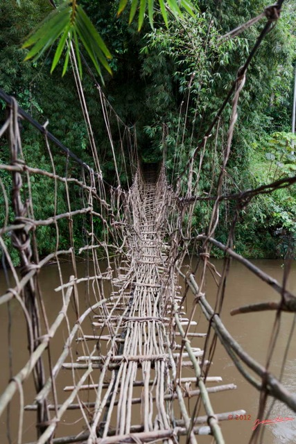 Traversé sur le pont en lianes sur l'Ogoulou